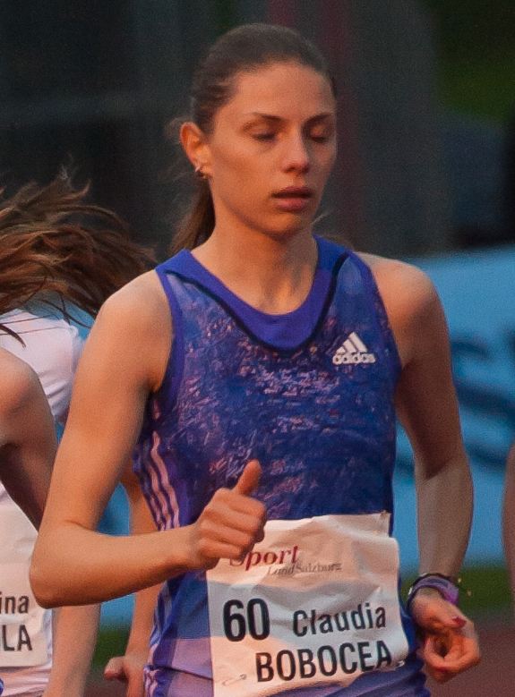 Salzburger Leichtathletik Gala am 27. Mai 2015: Jenny Wenth